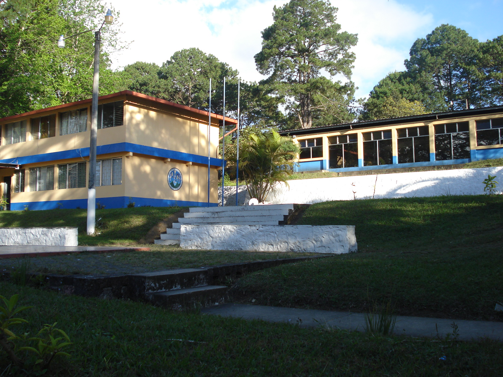 CUNOR-USAC